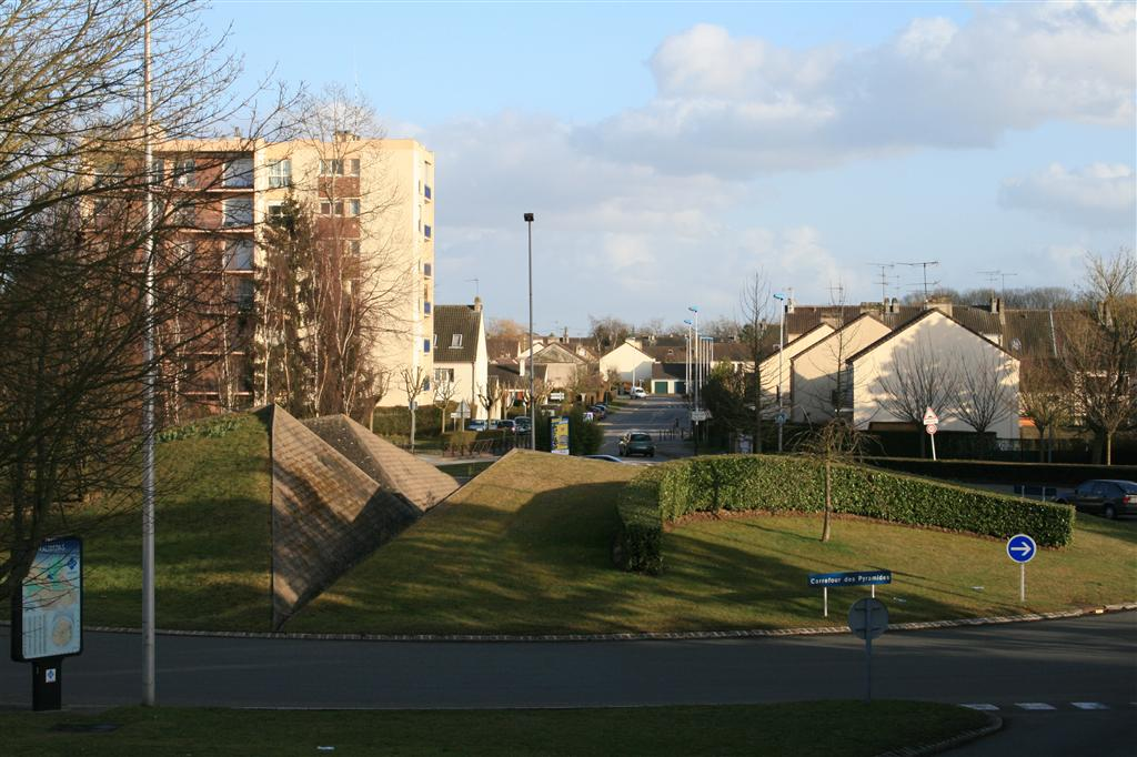 Carrefour des Pyramides à Maurepas (Yvelines)